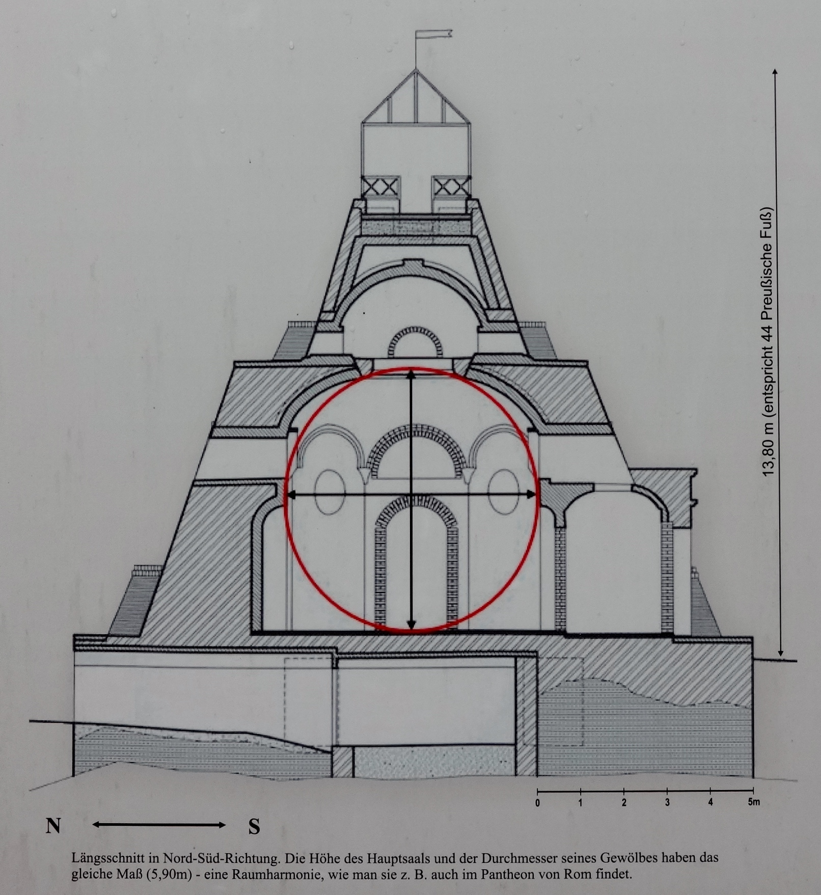 Abmessungen der Pyramide, aufgenommen auf einer öffentlich zugänglichen Abbildung im Park Pyramide des Grafen von Schmettau mit Landschaftspark und Schloss Garzau in Garzau-Garzin, Brandenburg